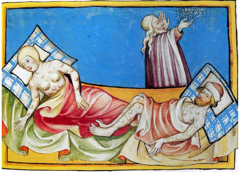 Peste bubonique - enluminure